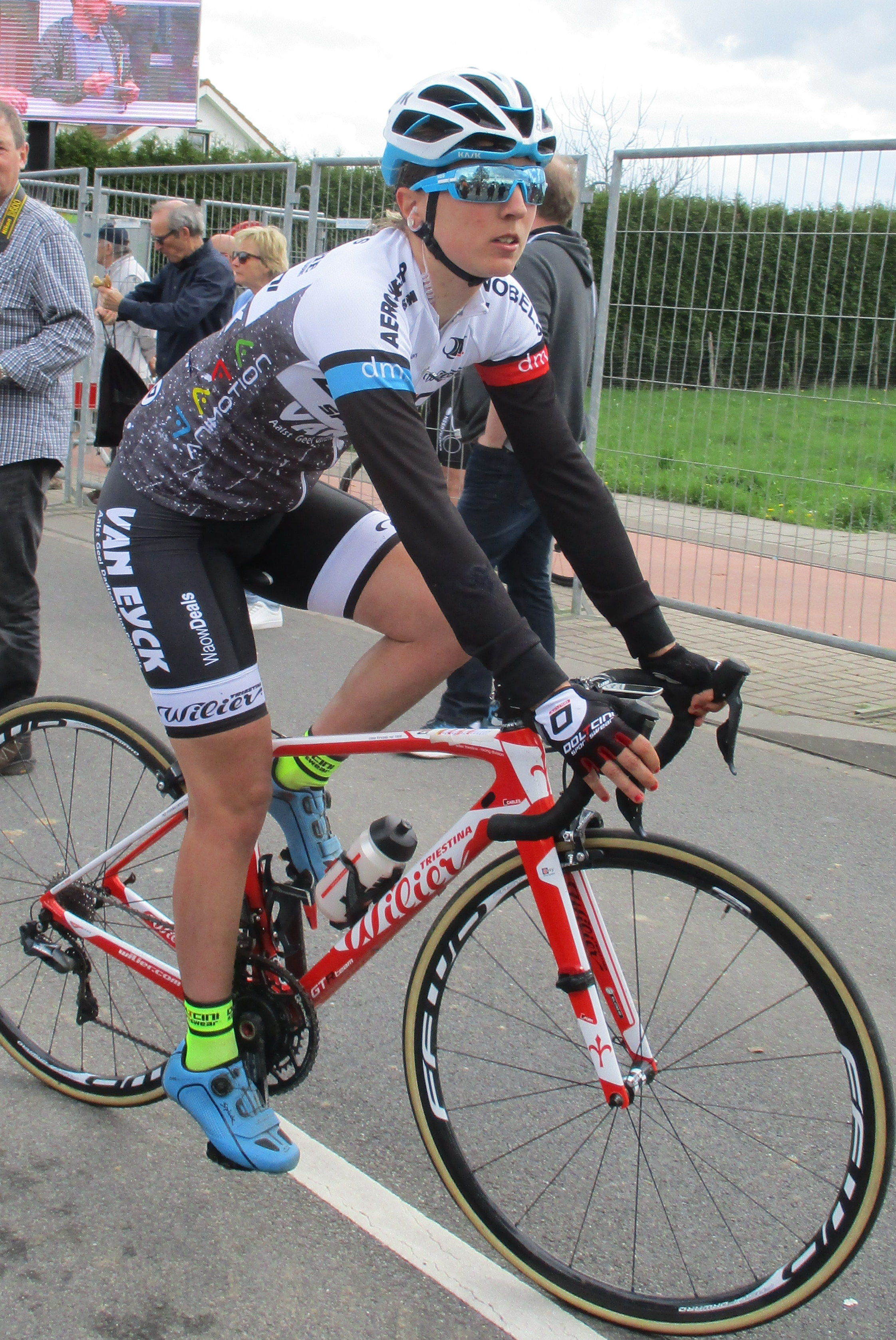 Finish van de Amstel Gold Race Ladies Edition 2018 in Berg, Valkenburg aan de Geul.